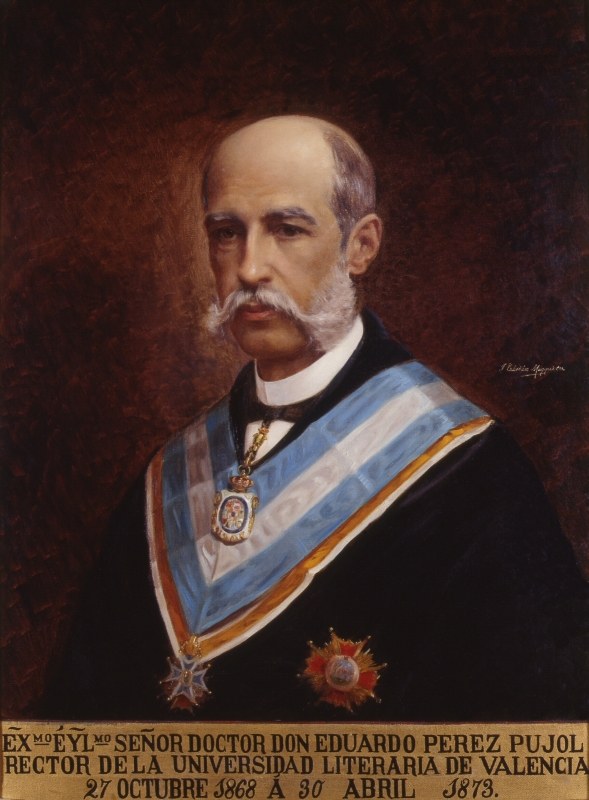 Retrato del jurista, historiador y sociólogo español Eduardo Pérez Pujol (1830-1894).